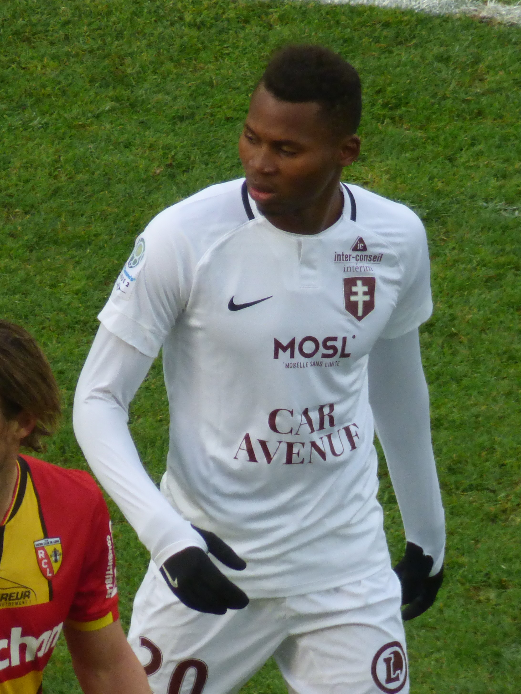 Habib Diallo pendant le match RC Lens / FC Metz, comptant pour la vingt-quatrième journée du championnat de France de Ligue 2 2018-2019, le 9 février 2019, au Stade Bollaert-Delelis.